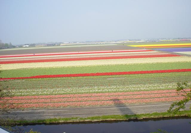 Bulb fields in Lisse